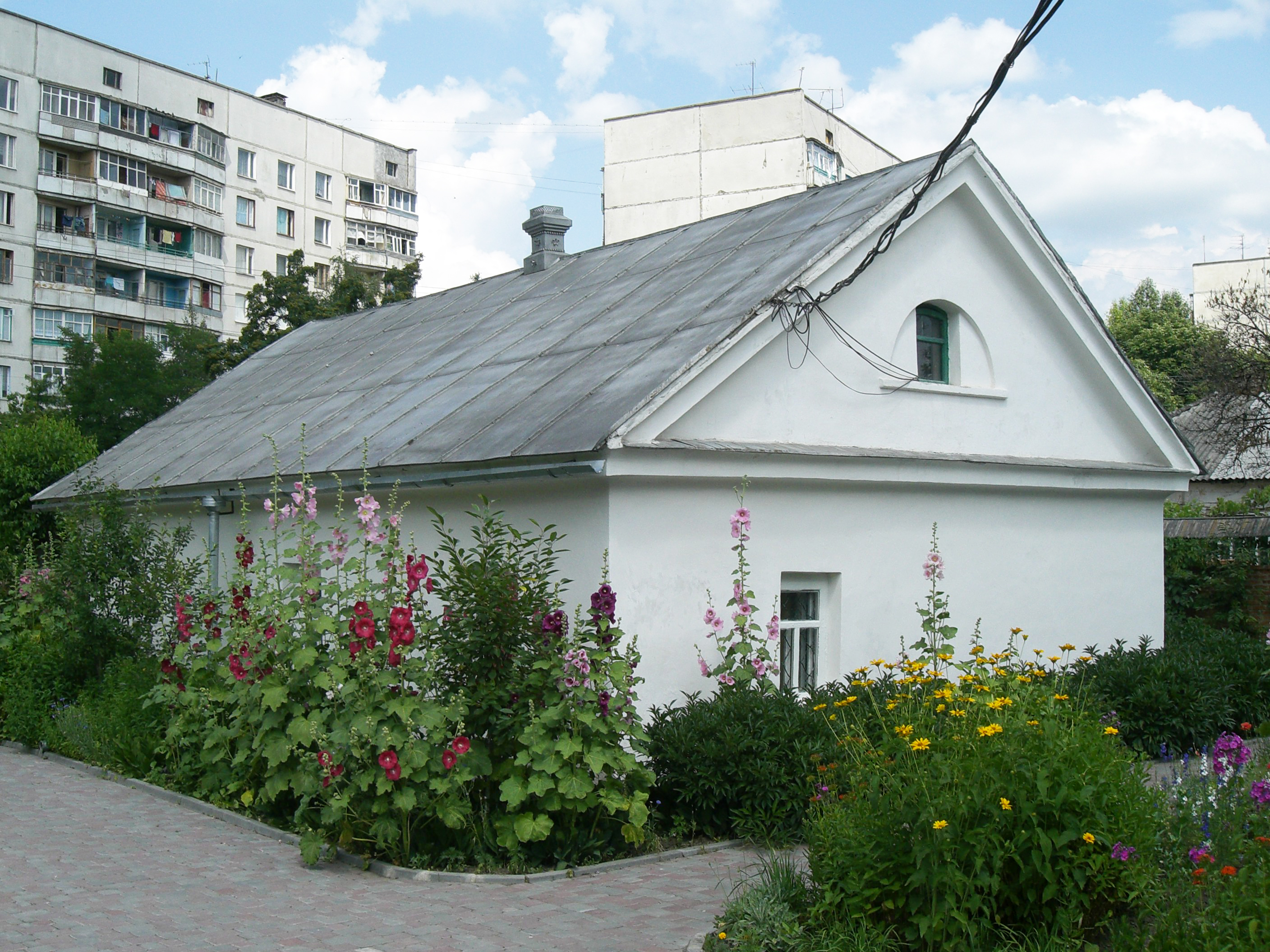 Житловий будинок військових поселян 1824р.у якому в 1876-1877рр. мешкав художник І.Ю.Рєпін, вул. Р.Люксембург, 8, м.Чугуїв, Харківська обл.